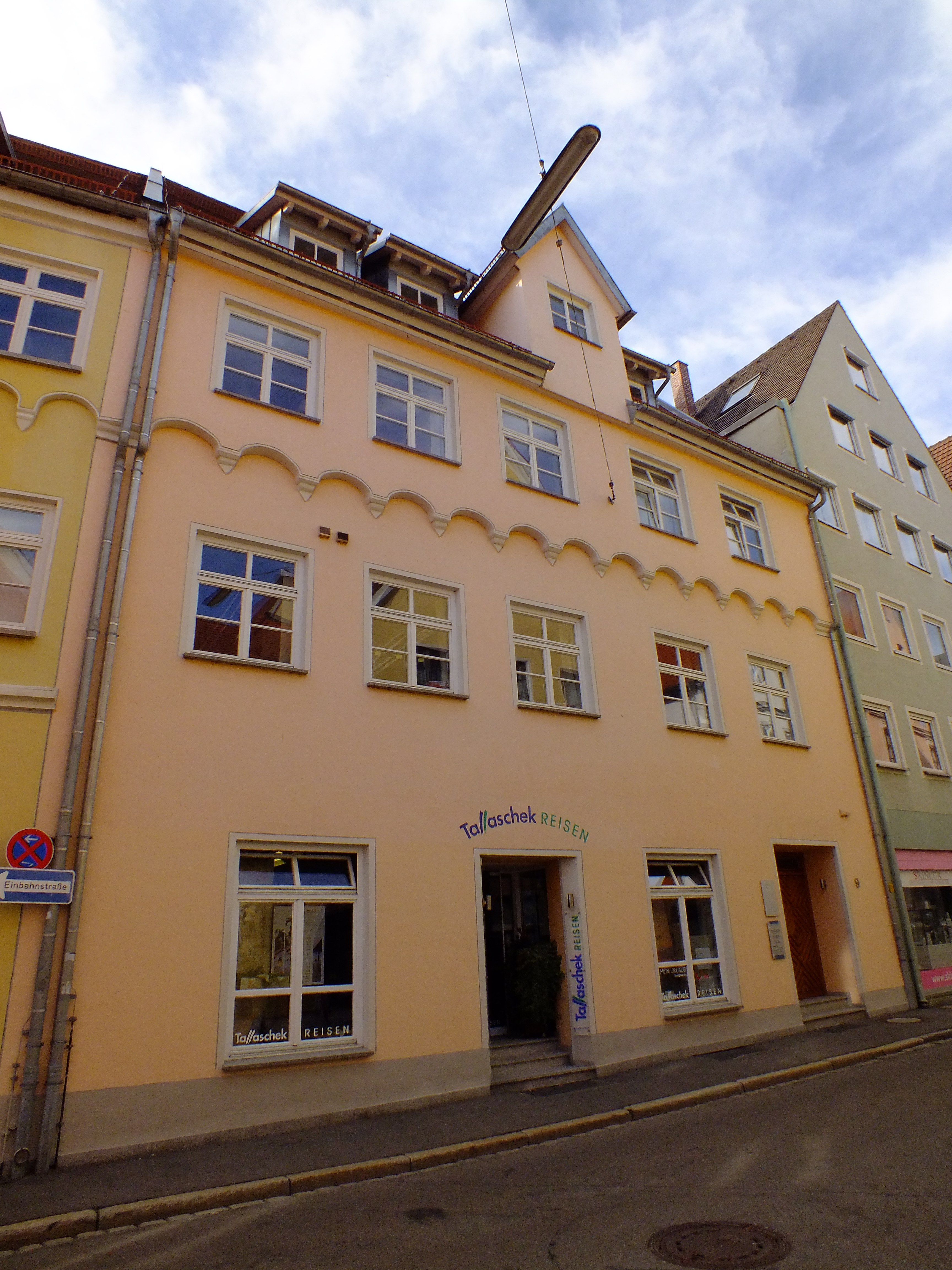 Baudenkmal im oberschwäbischen Memmingen